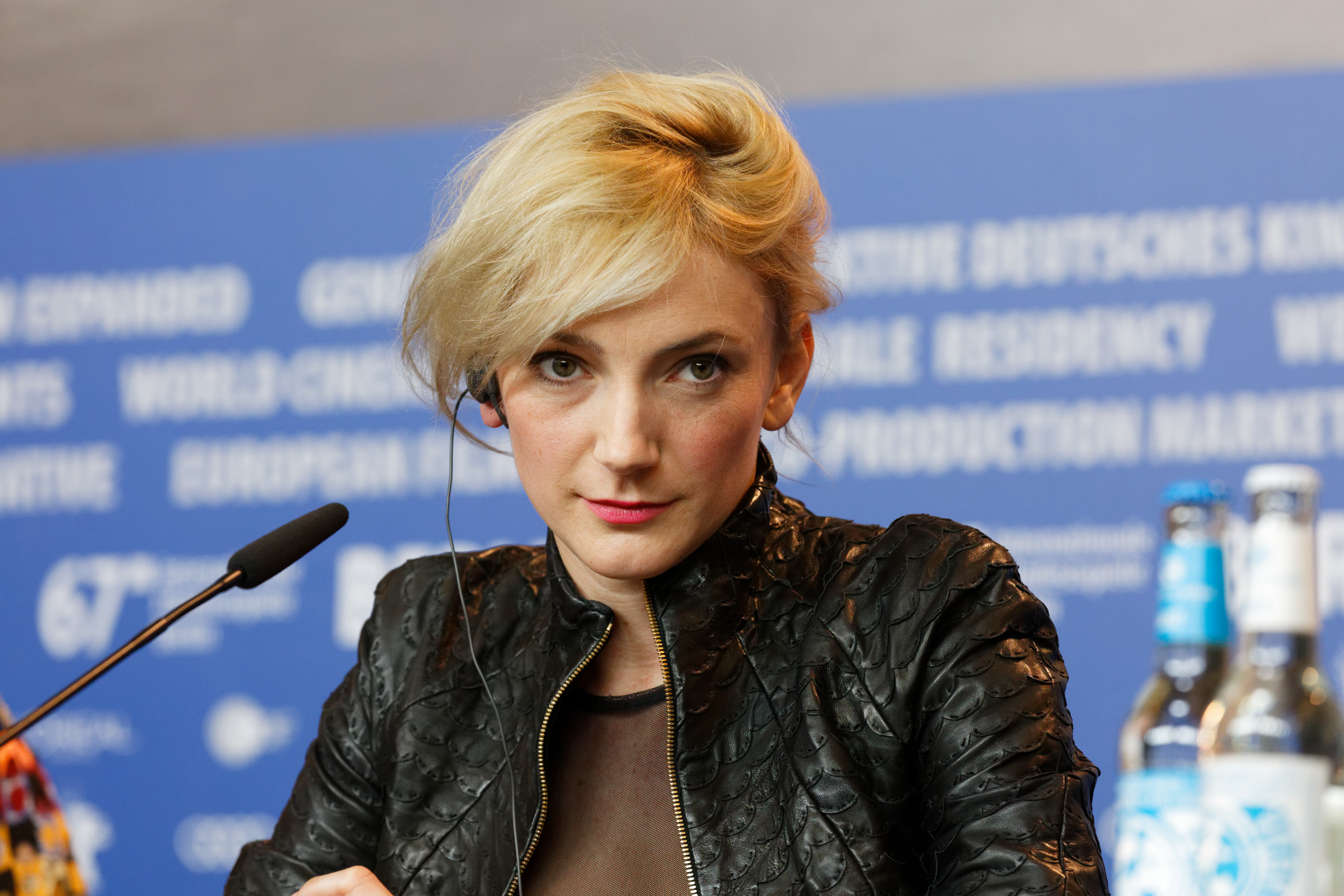 Alexandra Borbély bei der Pressekonferenz zu Testről és lélekről (On Body and Soul) zur Berlinale 2017